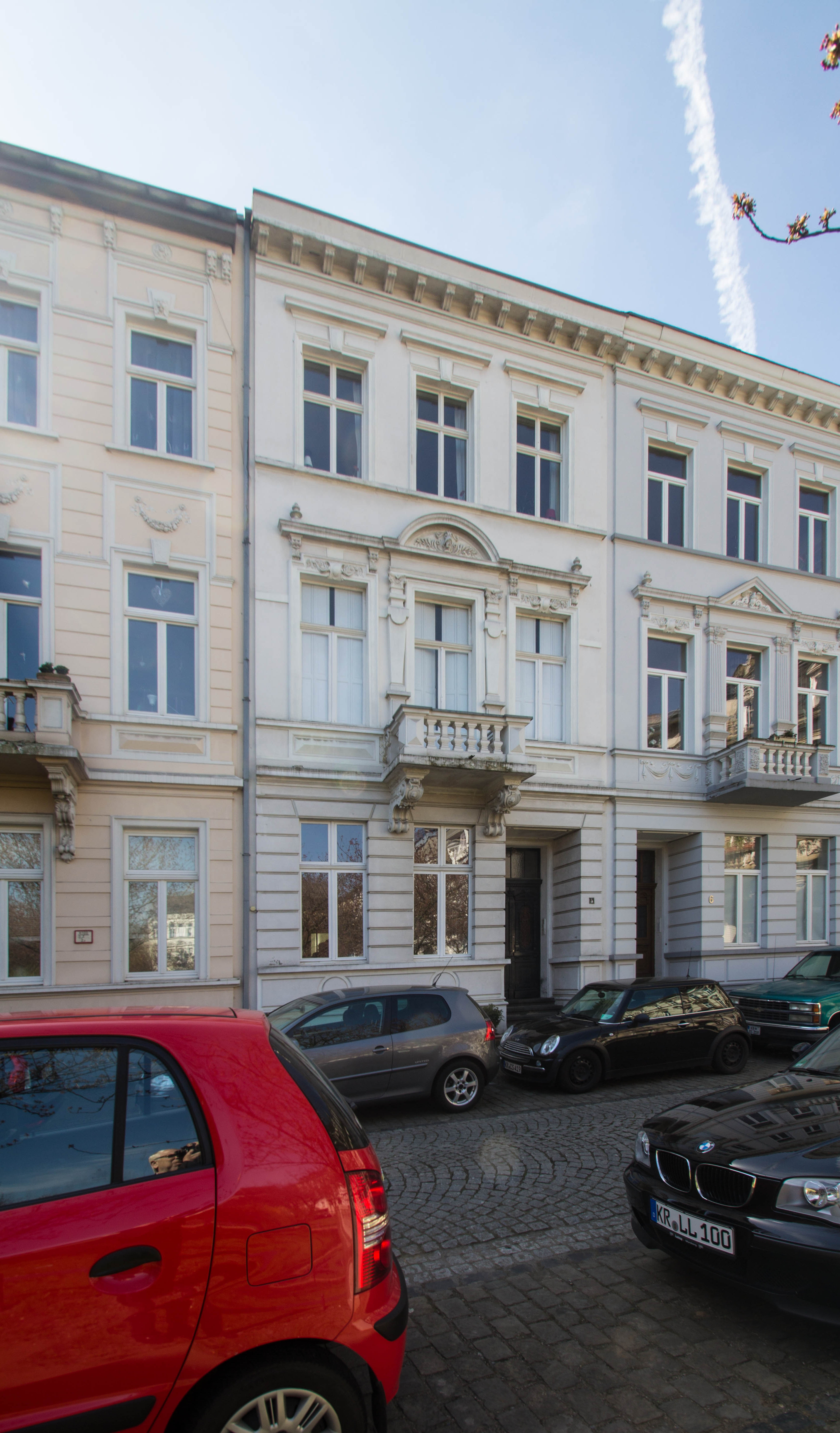 Krefeld, Alexanderplatz 5 This image shows a heritage building in Germany, located in the North Rhine-Westphalian city Krefeld (no. 777).